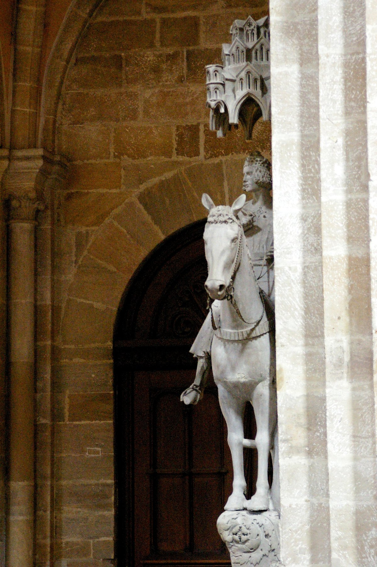 Bamberg Dom - Reiter im Profil